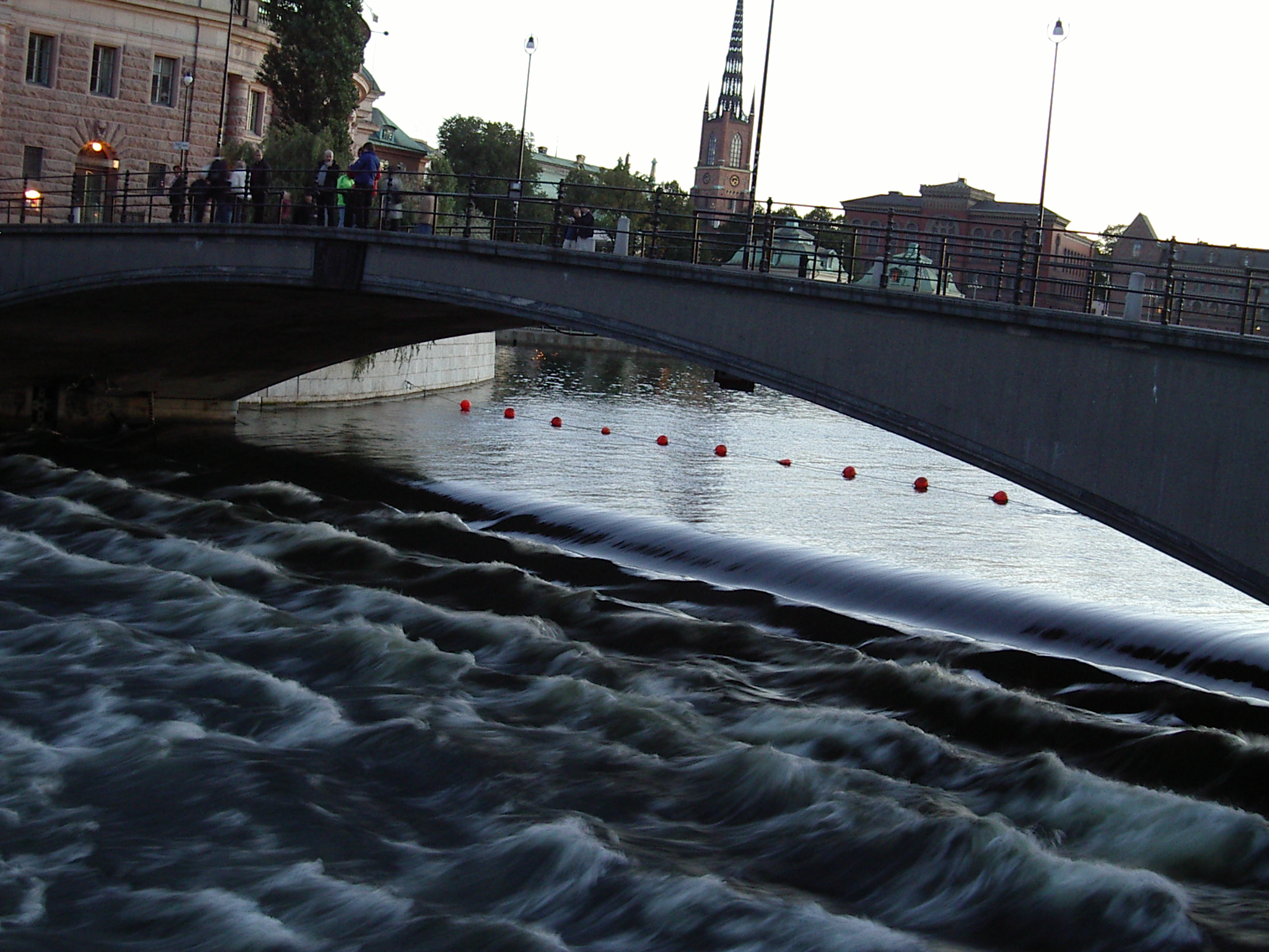 Mälaren and Baltic sea under the Riksbron, Stockholm, Sweden Връзка на Меларен с Балтийско море под моста Риксбрун, Стокхолм, Швеция